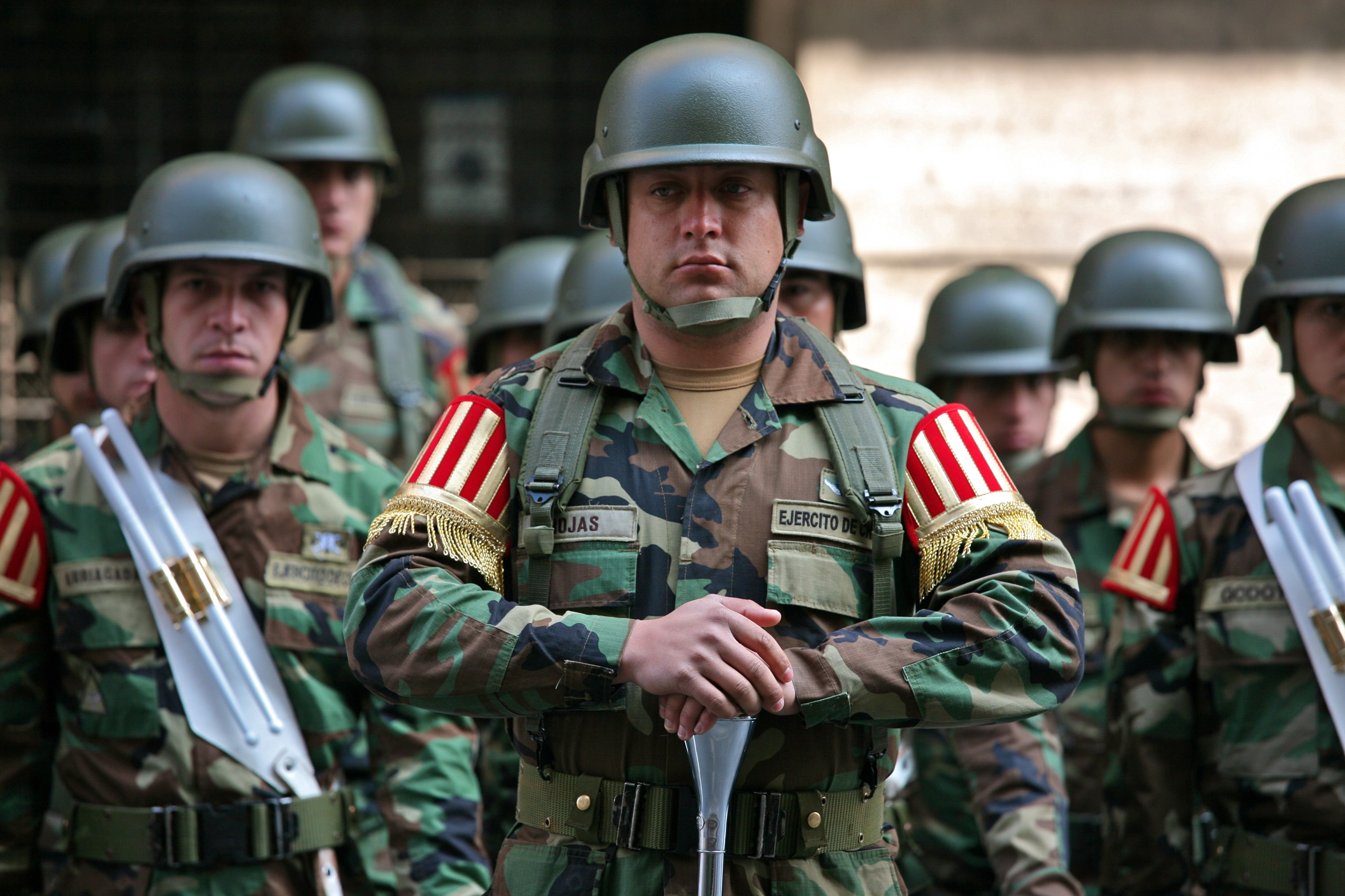 Chilská armádní kapela